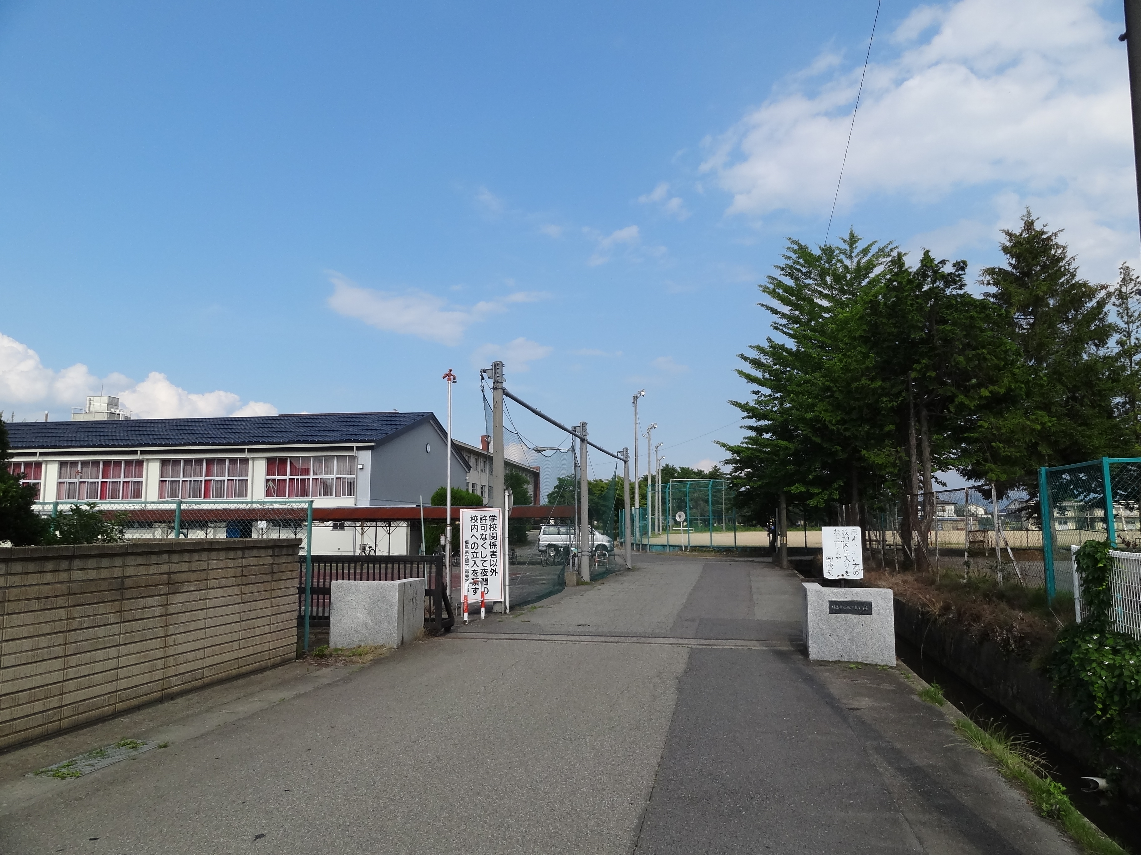 福島県立坂下高等学校